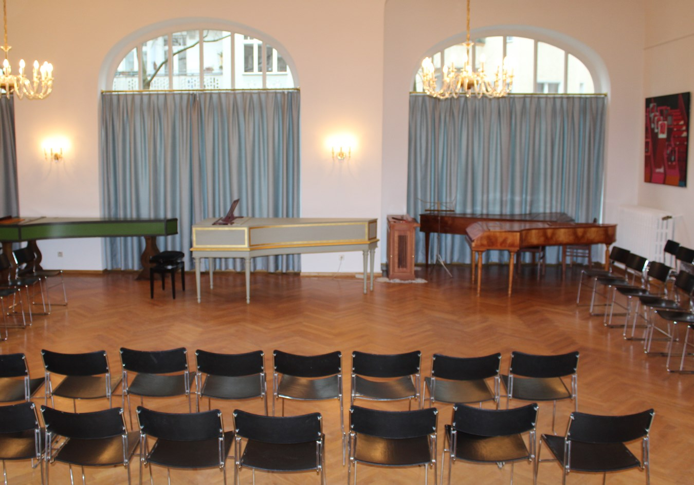 Kammermusiksaal Friedenau Isoldestr. 9